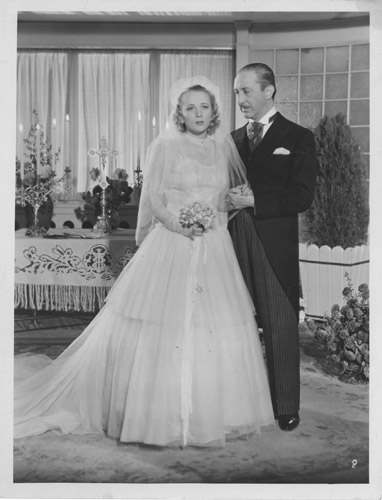 Fotografía blanco y negro sobre papel fotográfico brillante con marco perimetral blanco. Escena de la película "Hay que casar a Paulina". De espaldas a un altar, Paulina Singerman en el centro, con vestido de novia y Rafael Frontaura vestido de etiqueta tomándole la mano.